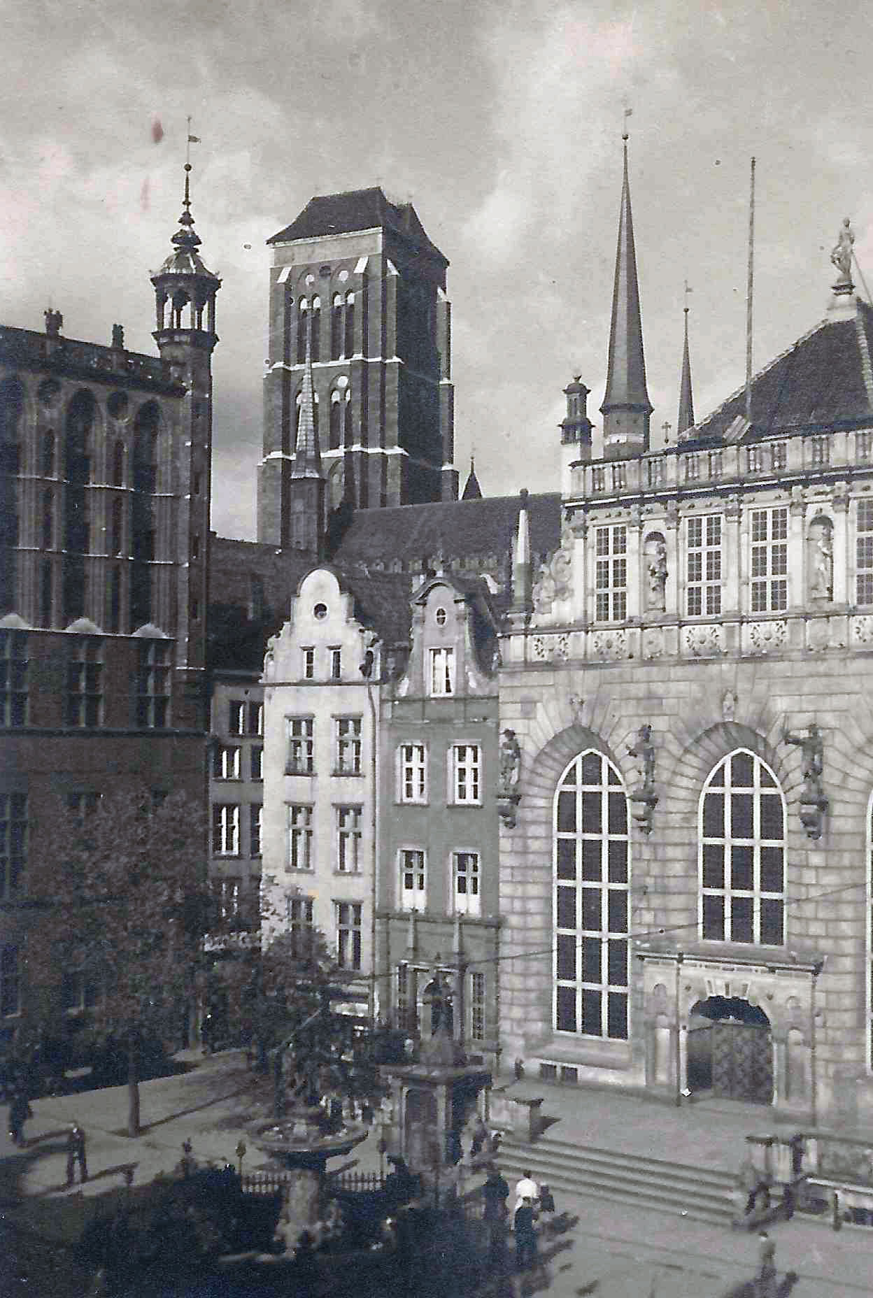 Bild des Artushofes zu Danzig aus dem Jahr 1927 vor seiner Zerstörung 1945.